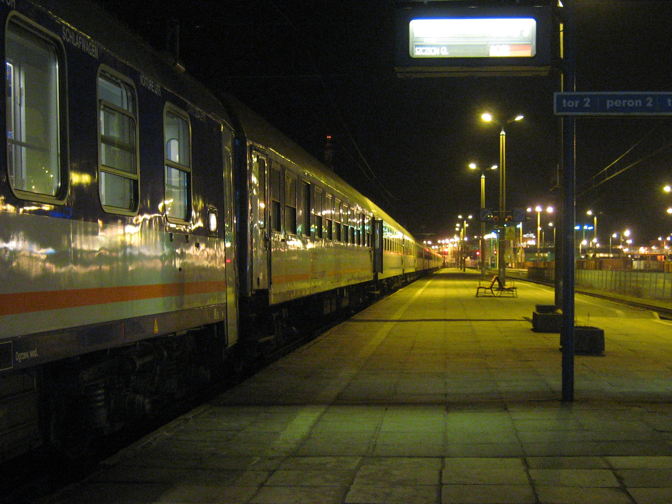 Peron na stacji w Świnoujściu.